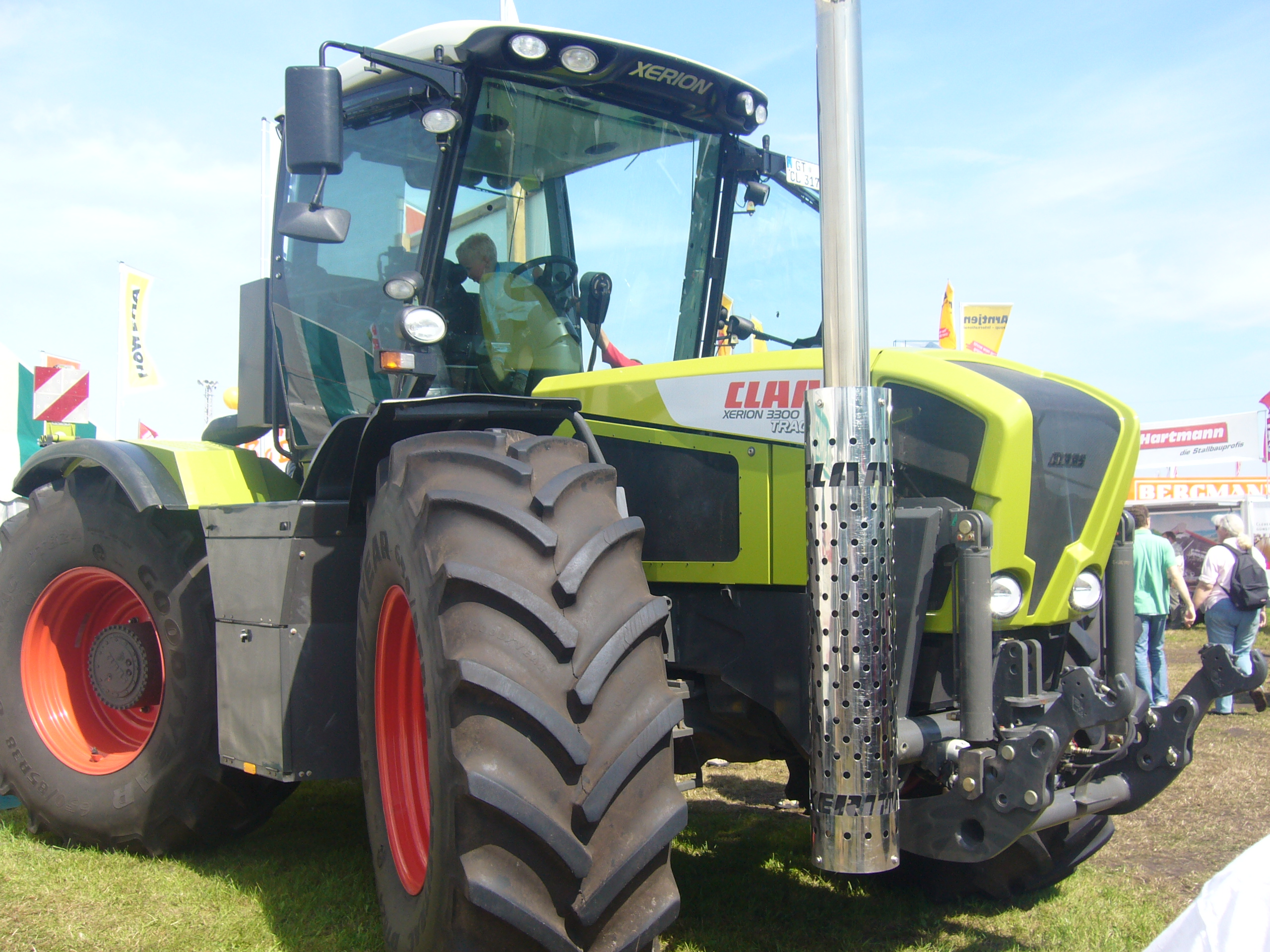 Ein Claas Xerion 3300 Traktor.